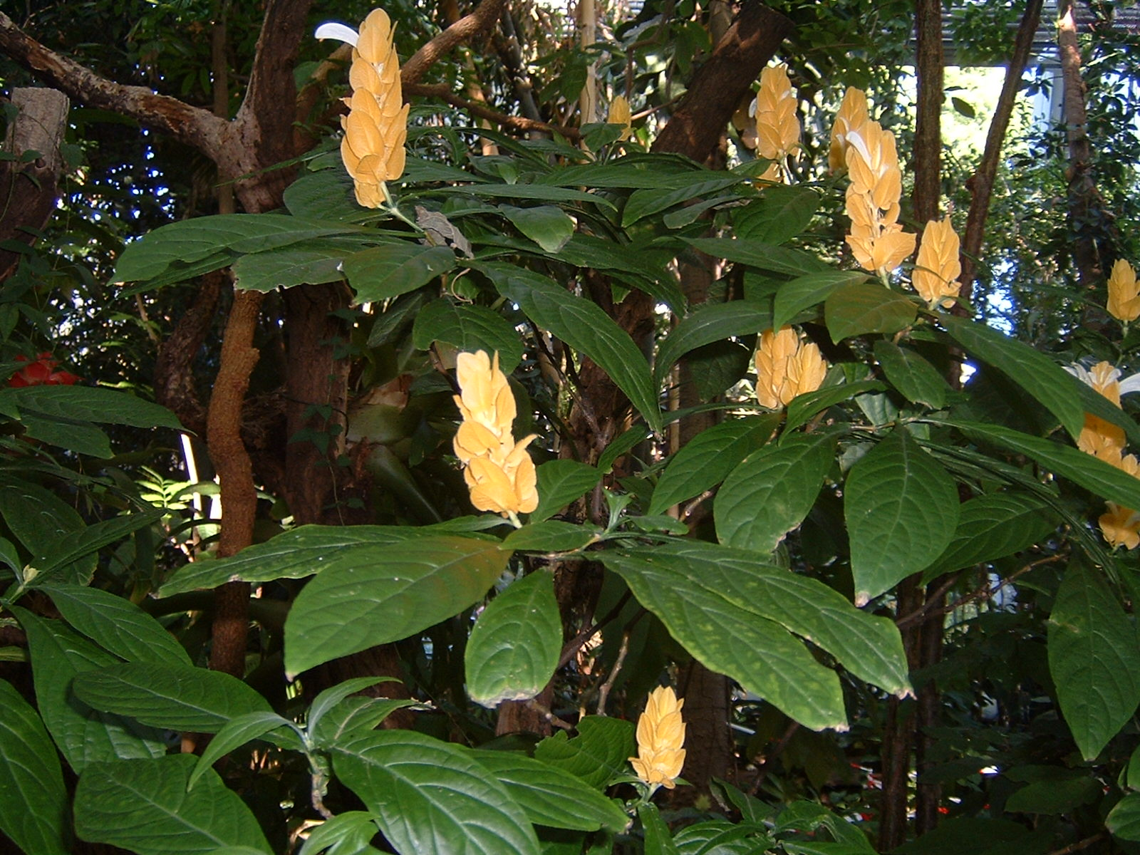 Pachystachys lutea im Botanischen Garten Bochum